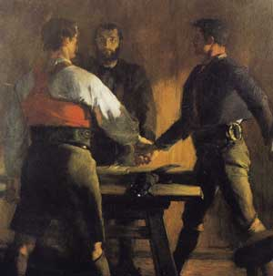 1809: Der "Dreischwur" beim Kreuzwirt in Brixen. Links Peter Mayr, Wirt an der Mahr, in der Mitte Martin Schenk, Kreuzwirt in Brixen, rechts Peter Kemenater, Wirt zu Schabs. Der Maler Albin Egger-Lienz nannte sein Bild "Schwur der Drei".